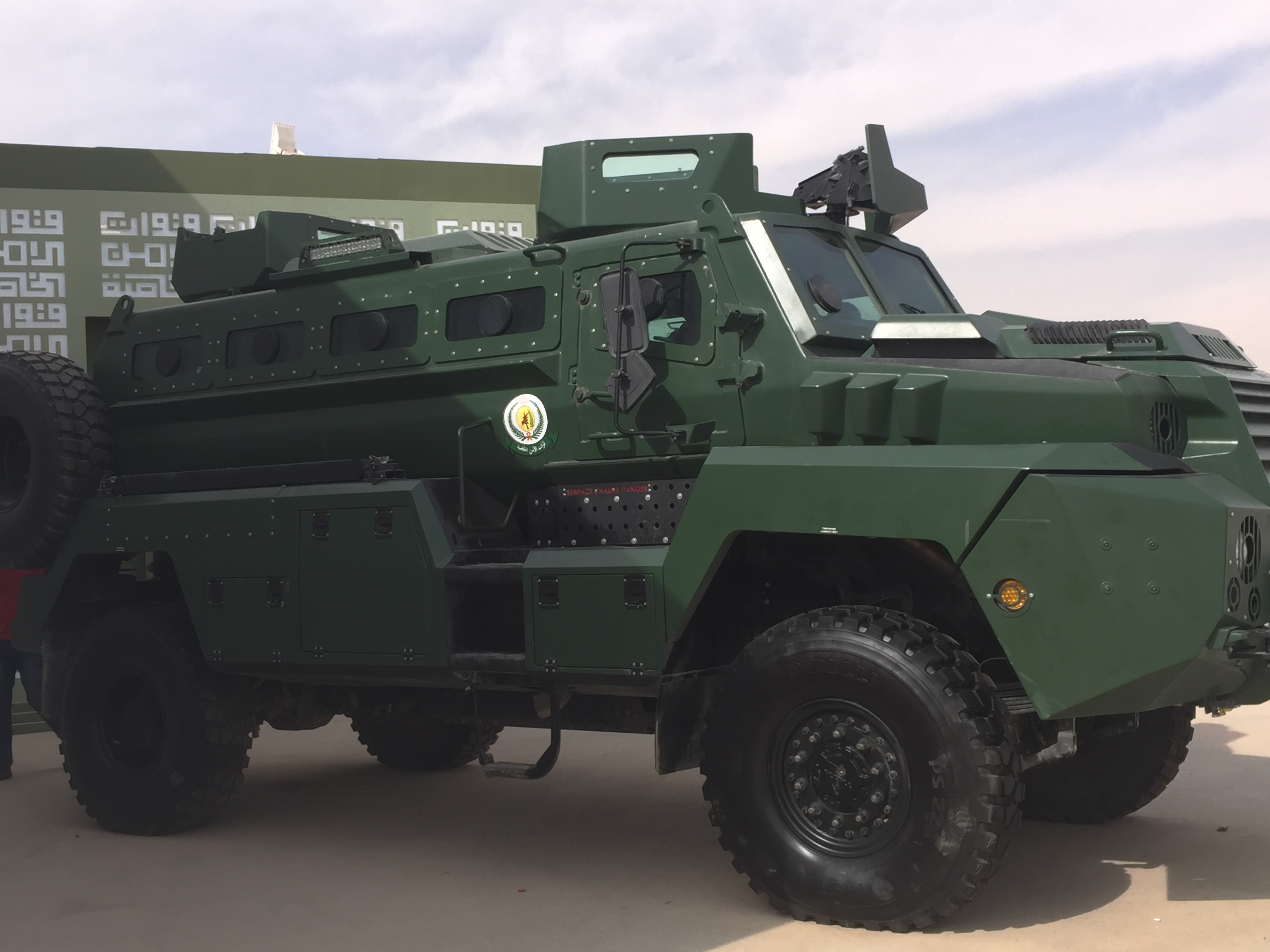 صور لمركبة CAPRIVI MK1 أثناء رحلتي إلى الجنادرية.